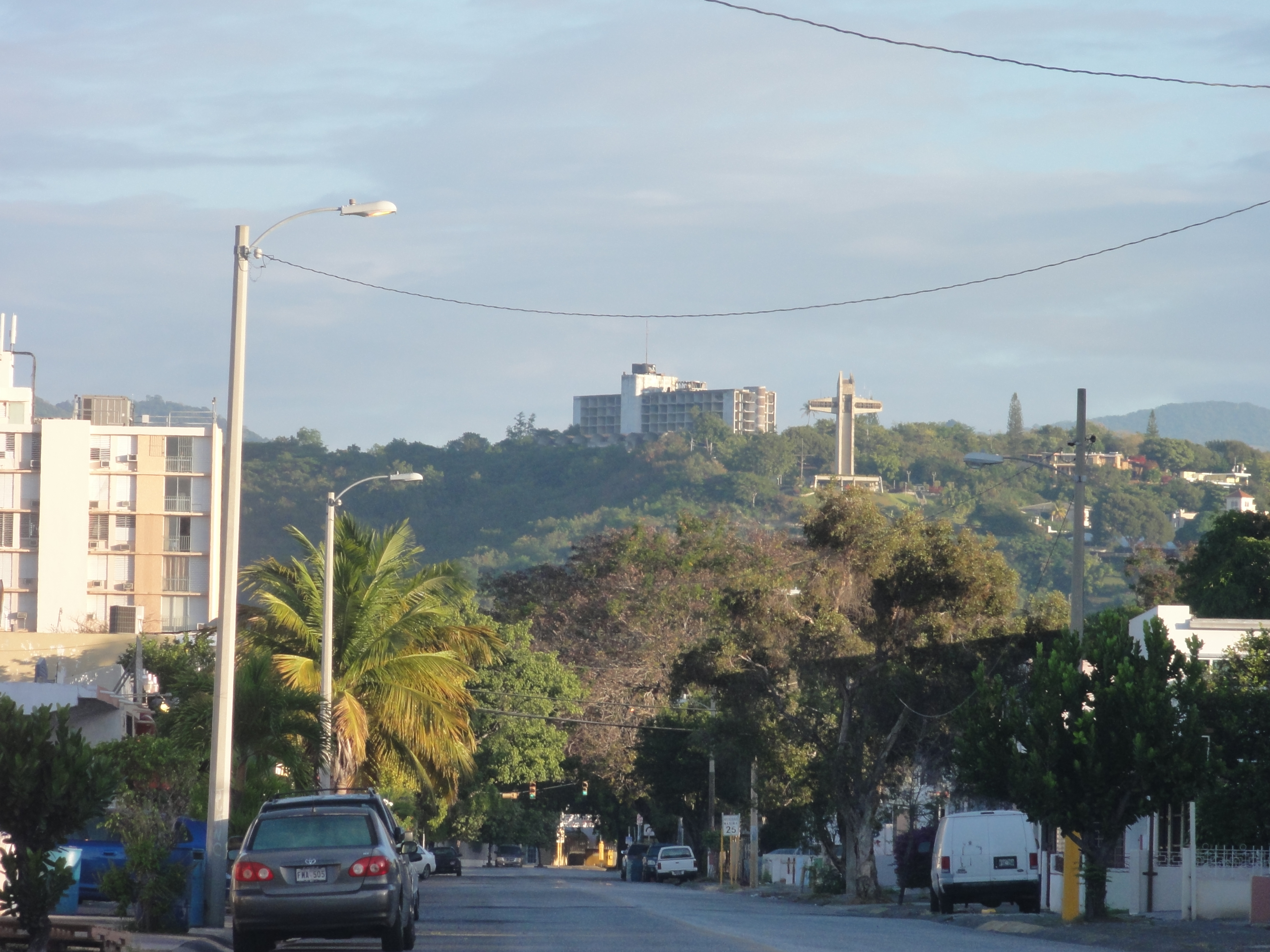 Hotel Ponce Intercontinental sobre el Cerro del Vigía en Barrio Portugués Urbano, Ponce, PR, mirando hacia el norte